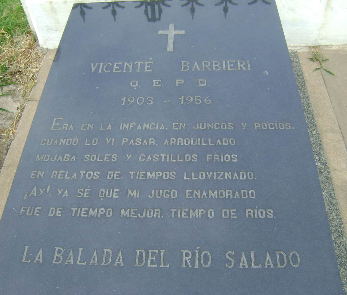 La lápida bajo la cual reposa el poeta Vicente Barbieri, tal como está en el Cementerio Municipal de Alberti, Provincia de Buenos Aires, República Argentina. Por orden del mismo Barbieri su cabeza está apuntando al Río Salado, que pasa unos kilómetros más al oeste.